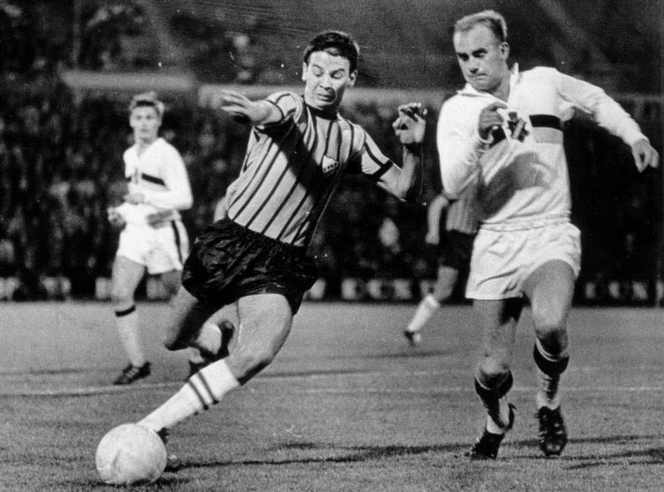 Claes Cronqivst (left)